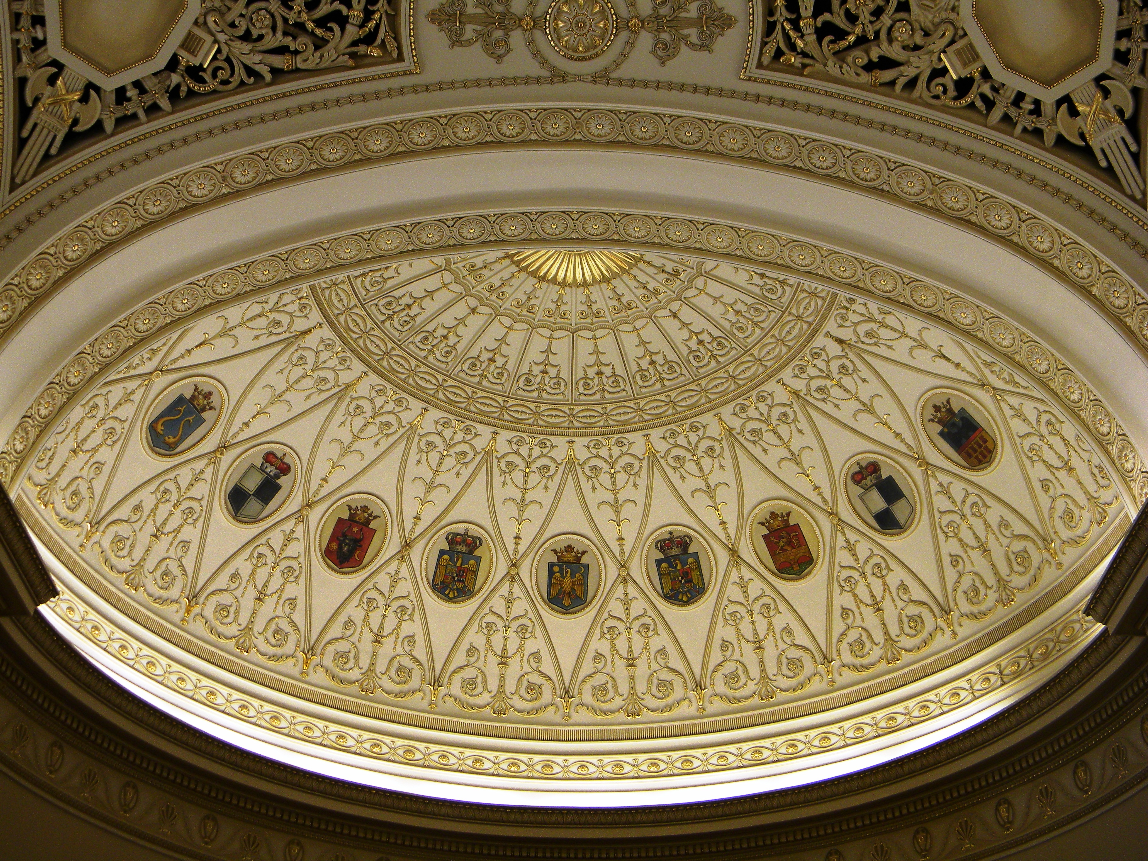 Bucuresti, Romania, Palatul Regal (Muzeul National de Arta al Romaniei - Pavilionul Sala Tronului - Sala Tronului - interior 8 - plafon ); B-II-m-A-19856